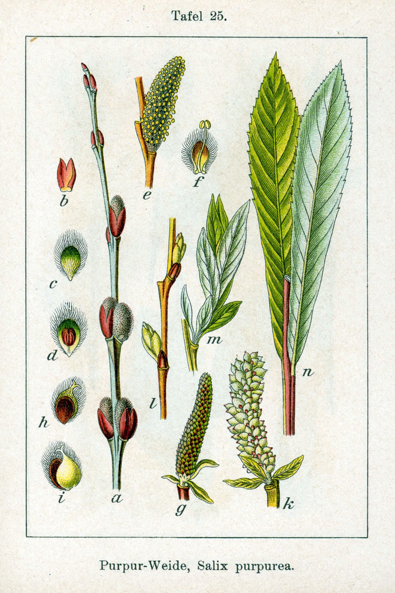 Salix purpurea L. Original Description Purpur-Weide, Salix purpurea